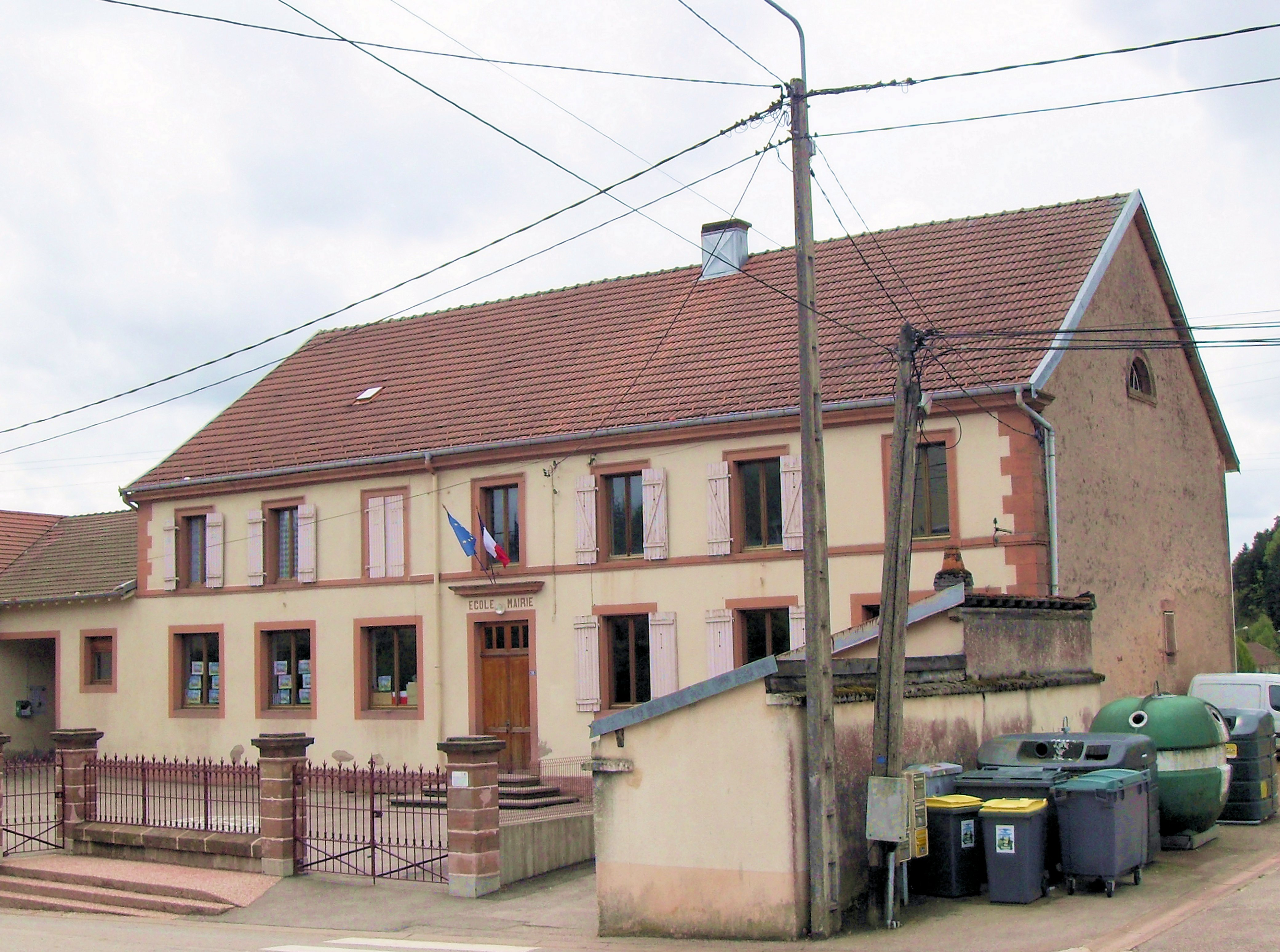 La mairie-école de Biffontaine